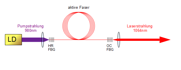 Aufbau eines Faserlasers. Pumpstrahlungseinkopplung durch die Endfläche der Faser.